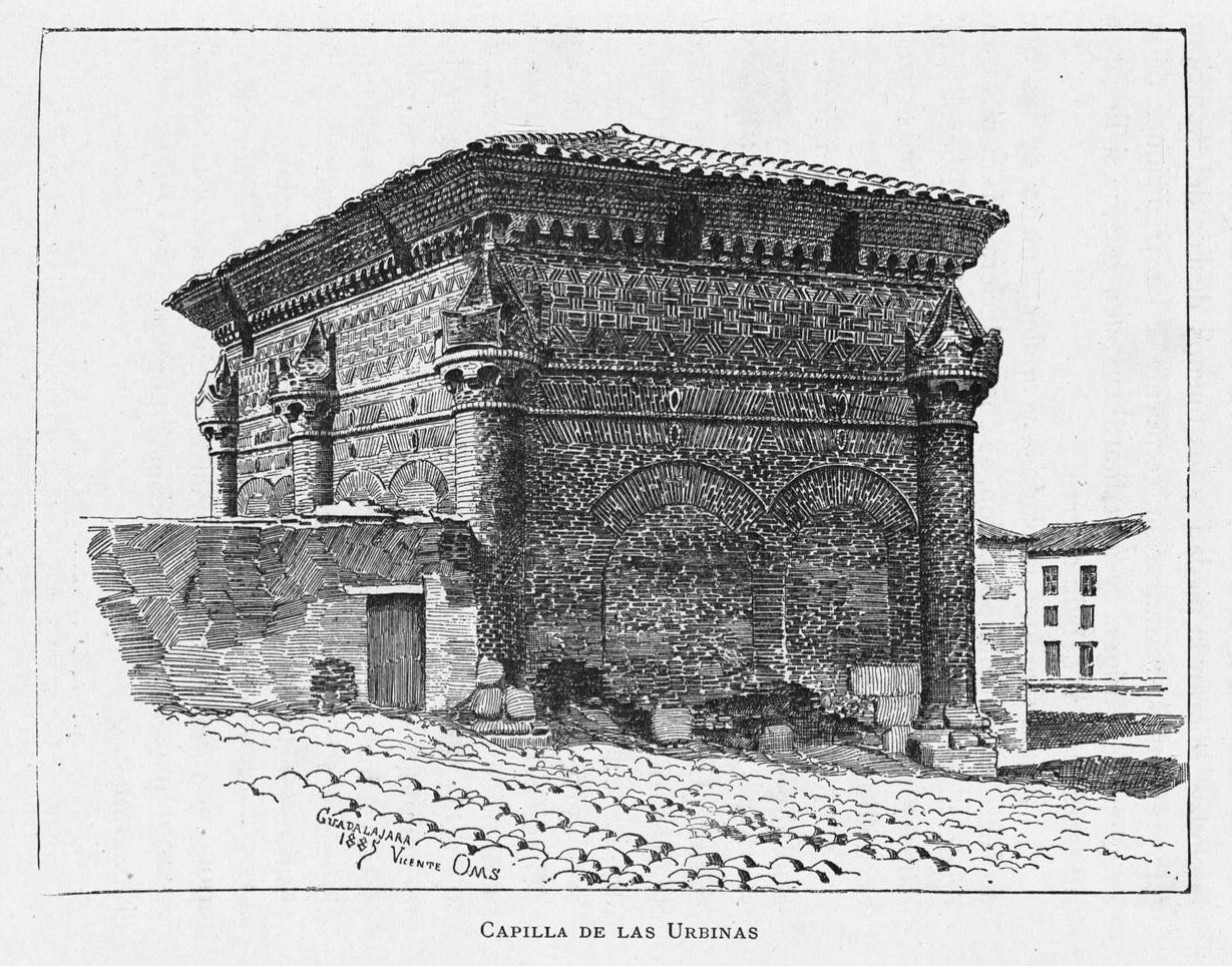 Capilla de las Urbinas, en Guadalajara.